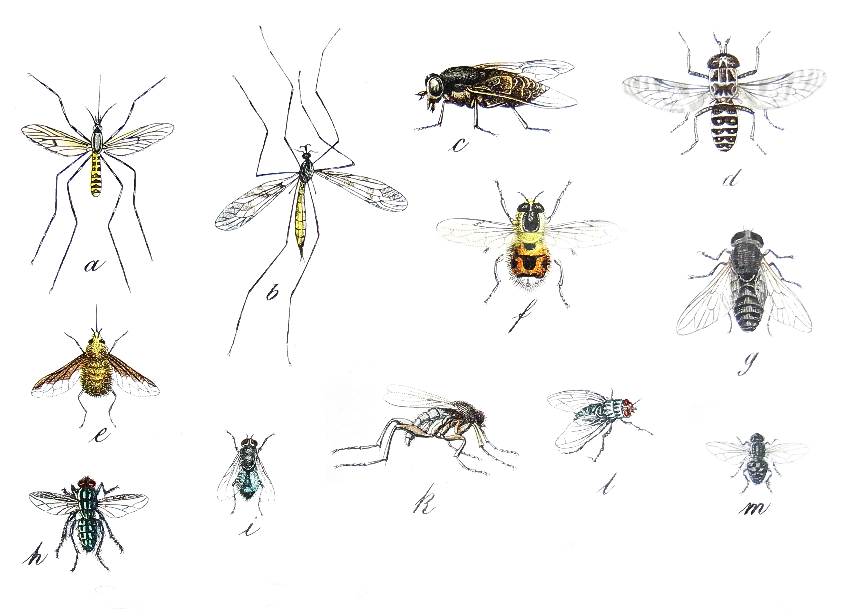 Bearbeiteter Ausschnitt von Tafel XXIII a) Culex pipiens b) Nephrotoma pratensis c) Tabanus bovinus d) Haematopota pluvialis e) Bombylius major f) Volucella bombylans g) Gasterophilus nasalis h) Sarcophaga carnaria i) Calliphora vomitoria k) Borophaga incrassata l) Musca domestica m) Stomoxys calcitrans